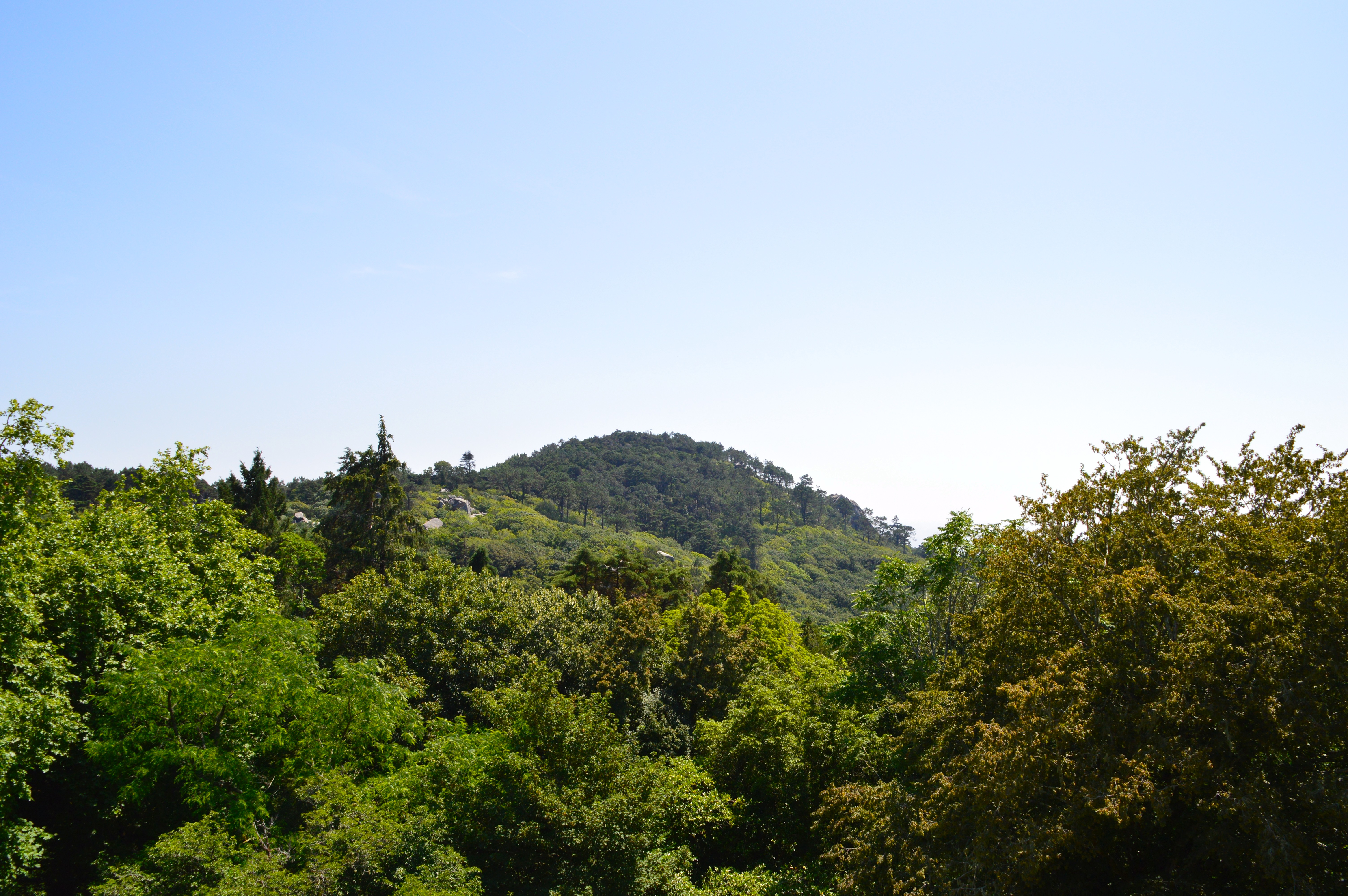 Parque da Pena, Sintra